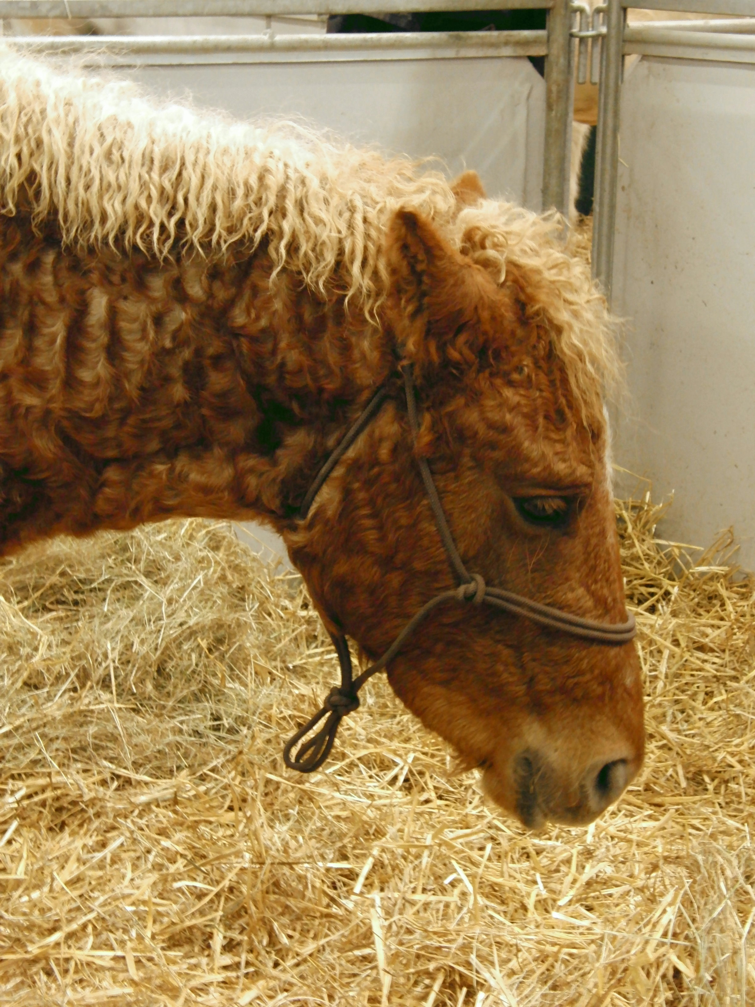 Cheval Curly - Salon du cheval de Paris 2013, Parc des expositions de Paris-Nord Villepinte, France